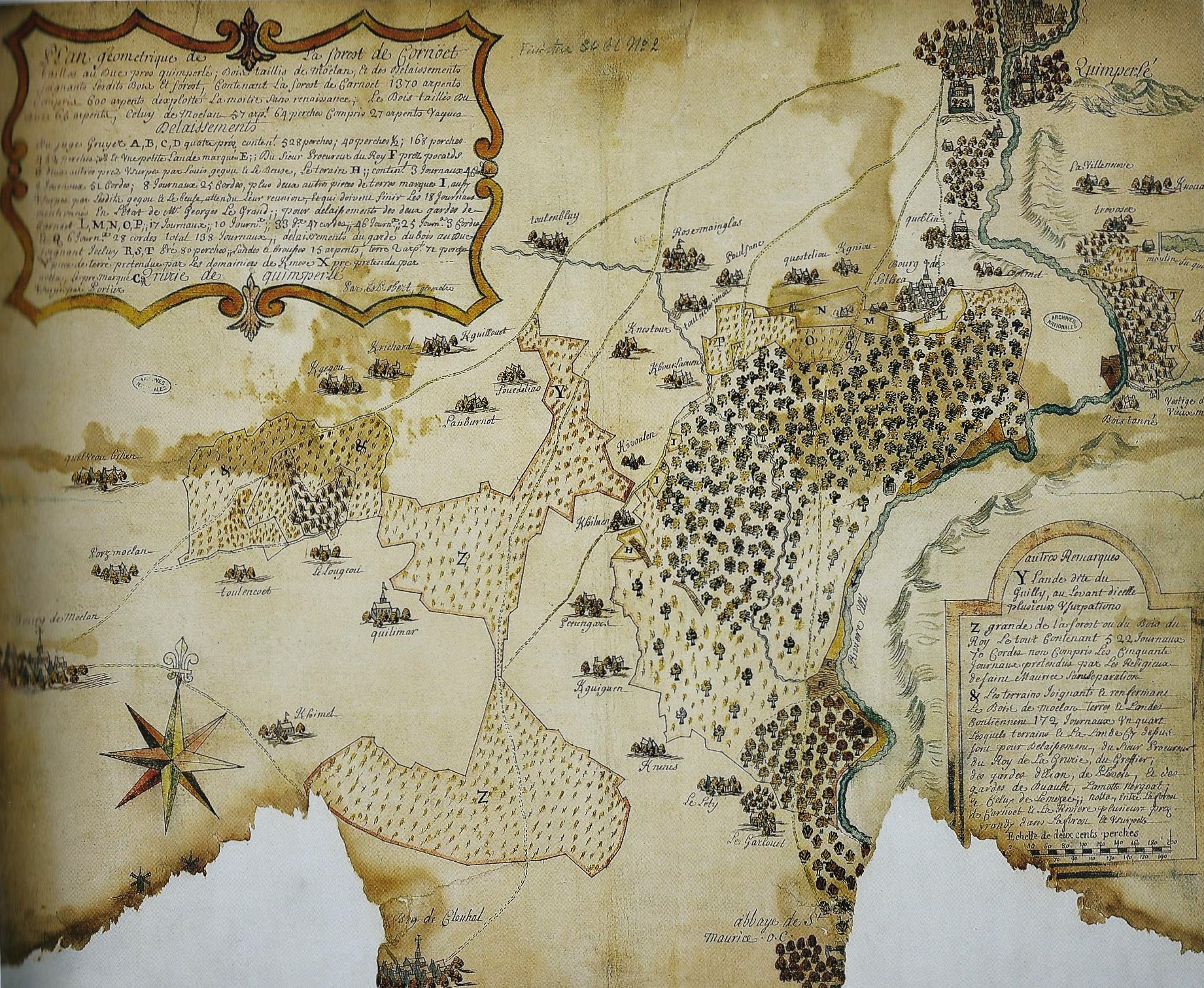 Plan de la forêt de Carnoët en 1731, par B. Robert, géomètre (Archives nationales)